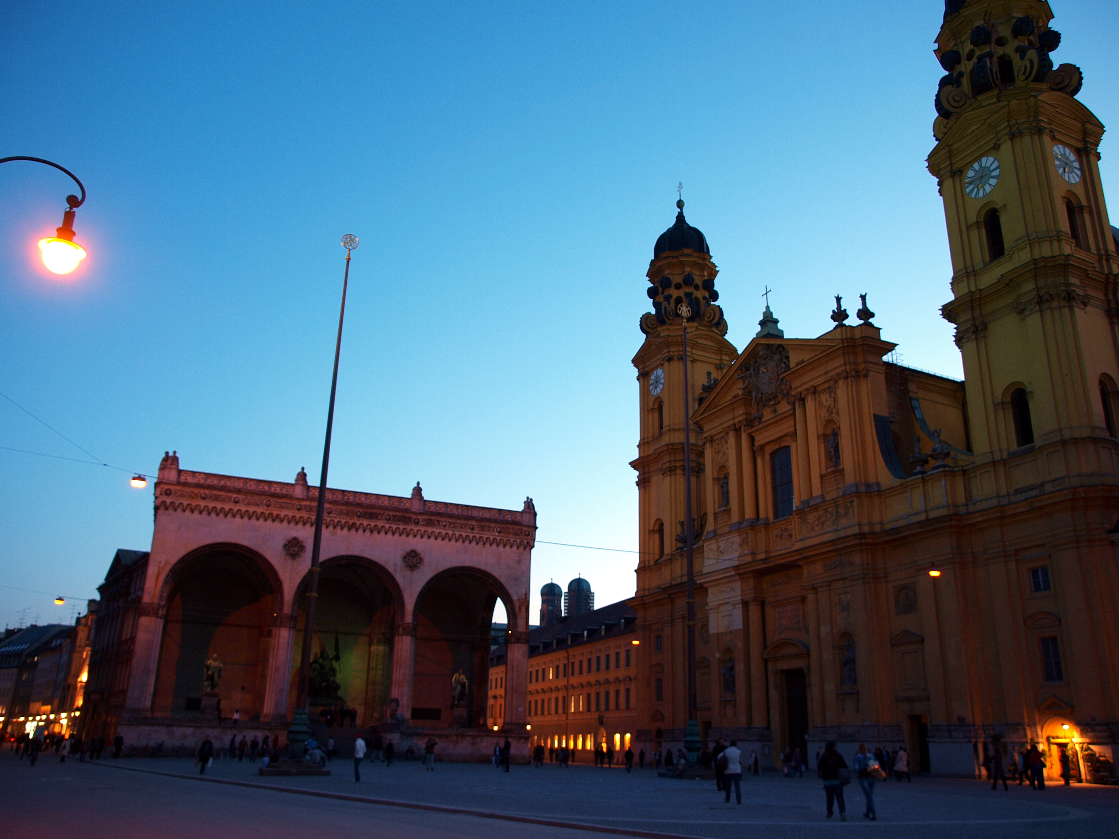 Odeonsplatz in München (Munich), Germany